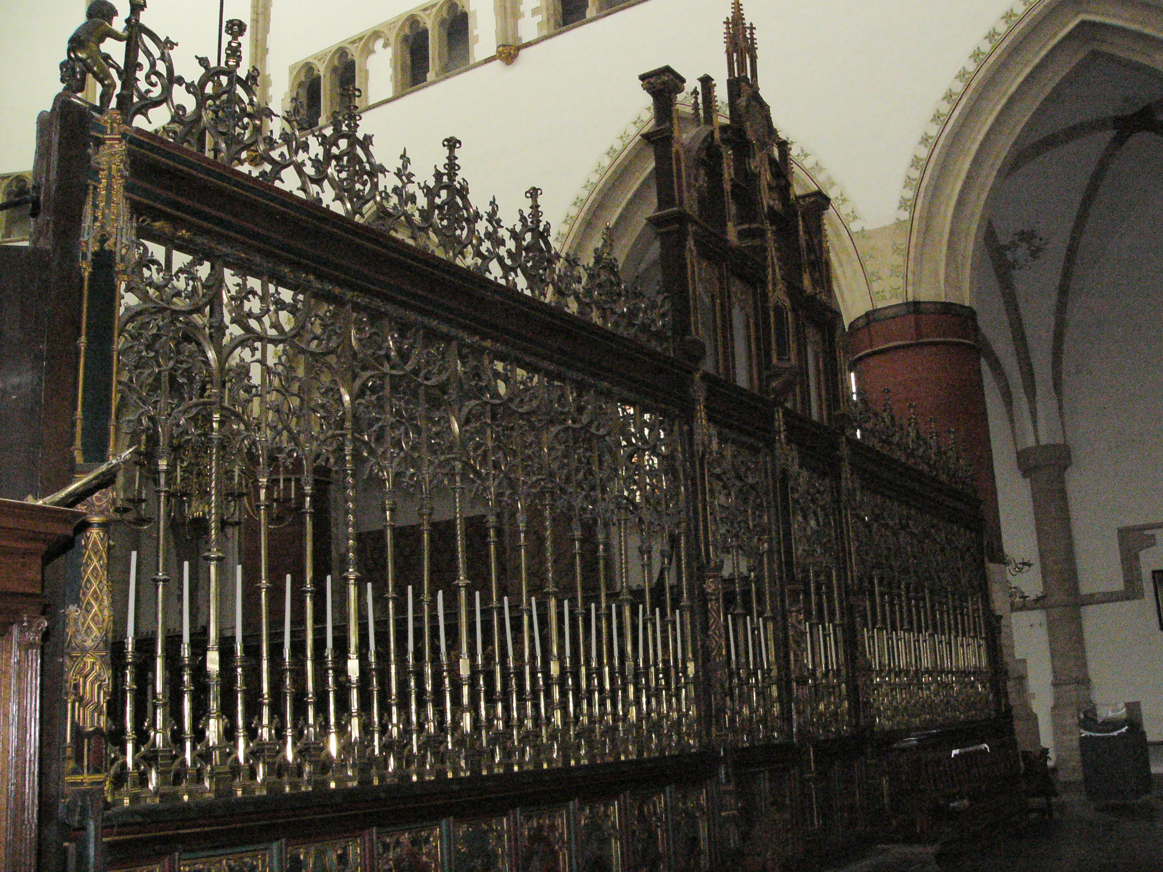 Koor van de Grote Kerk Haarlem in Haarlem